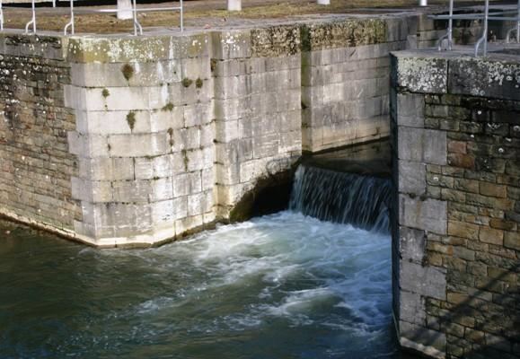 Ecluse Chênée ou écluse N° 2 Porte avale.